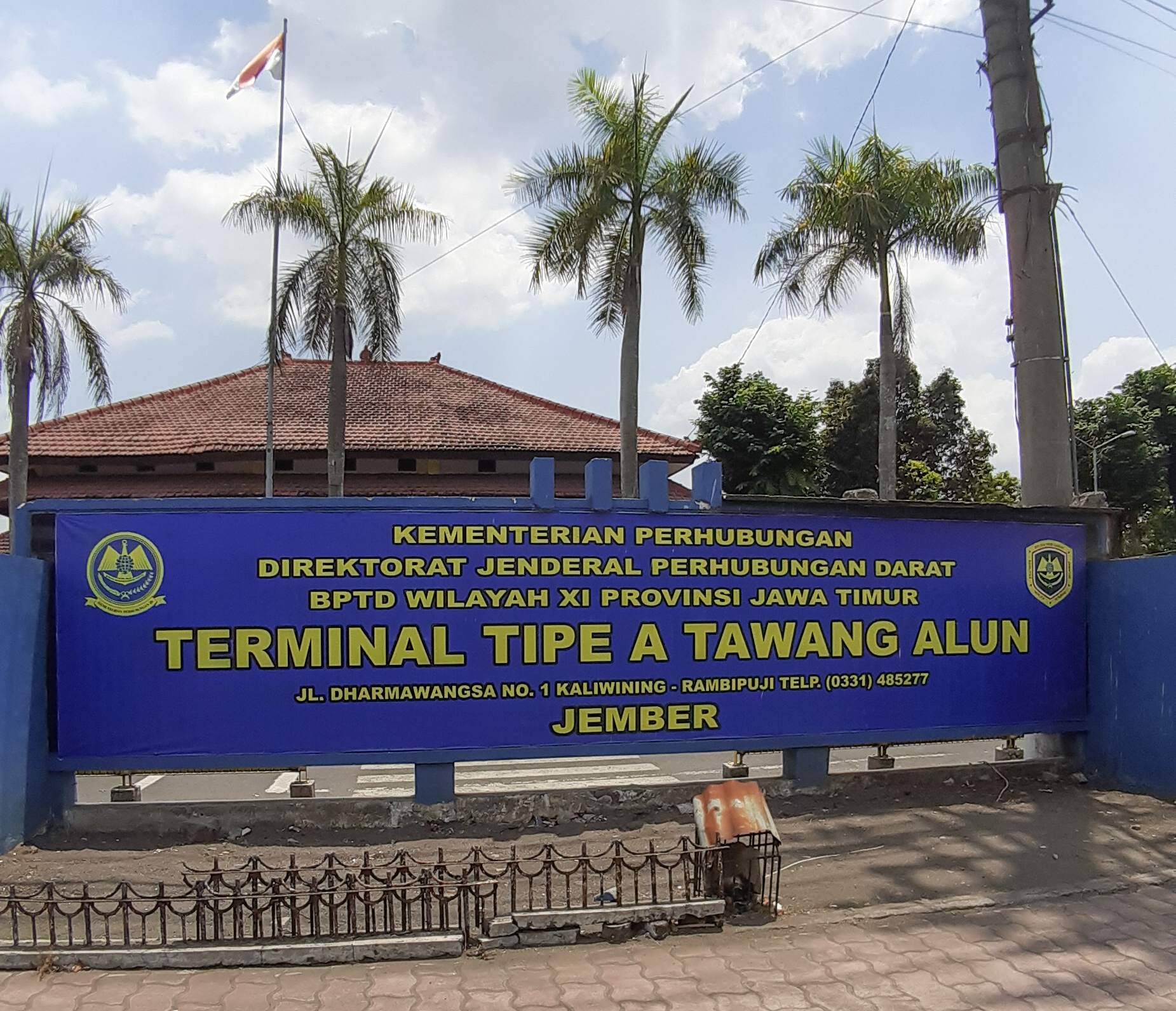 Papan nama Terminal Tawang Alun